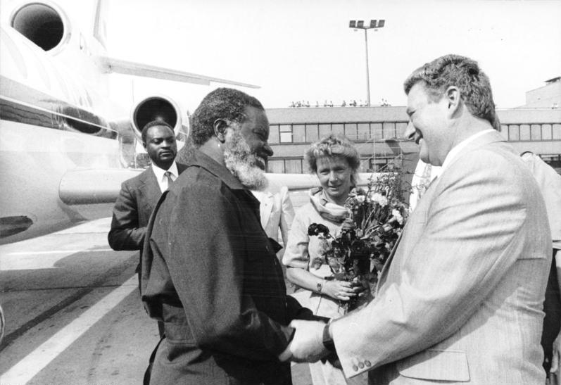 Berlin, Günter Sieber begrüßt Sam Nujoma (SWAPO, Namibia) ADN-ZB/Franke/ 18.8.89 Berlin: Der Präsident der Südwestafrikanischen Volksorganisation (SWAPO) von Namibia, Sam Nujoma, traf zu einem Arbeitsbesuch in der DDR ein. Er wurde von Günter Sieber, Mitglied des ZK der SED und Leiter der Abteilung Internationale Verbindungen, auf dem Flughaben herzlich begrüßt. Anwesend war auch der Vertreter der SWAPO in der DDR, Shikwetepo Haindongo. Abgebildete Personen: Nujoma, Sam: Präsident der South West African People´s Organization (SWAPO), Namibia Sieber, Günter: Leiter der Abteilung Internationale Verbindungen ZK der SED, Volkskammerabgeordneter, DDR